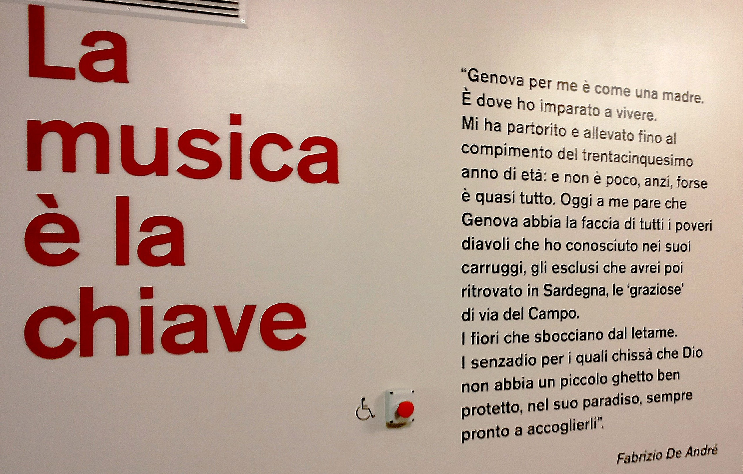 Via del Campo 29r – Emporio museo musicale Nel cuore del centro storico di Genova al n. 29rosso di Via del Campo, lo storico Negozio – Museo della Musica d’Artista , del cantautore-poeta Fabrizio De Andre’. Un viaggio nel passato dove musica e poesia si incontrano e accompagnano il visitatore in un cammino “sospeso “ fatto di fotografie, scritti, strumenti e dischi originali in vinile, e ancora libri e riviste dell’epoca . This is a photo of a monument which is part of cultural heritage of Italy.